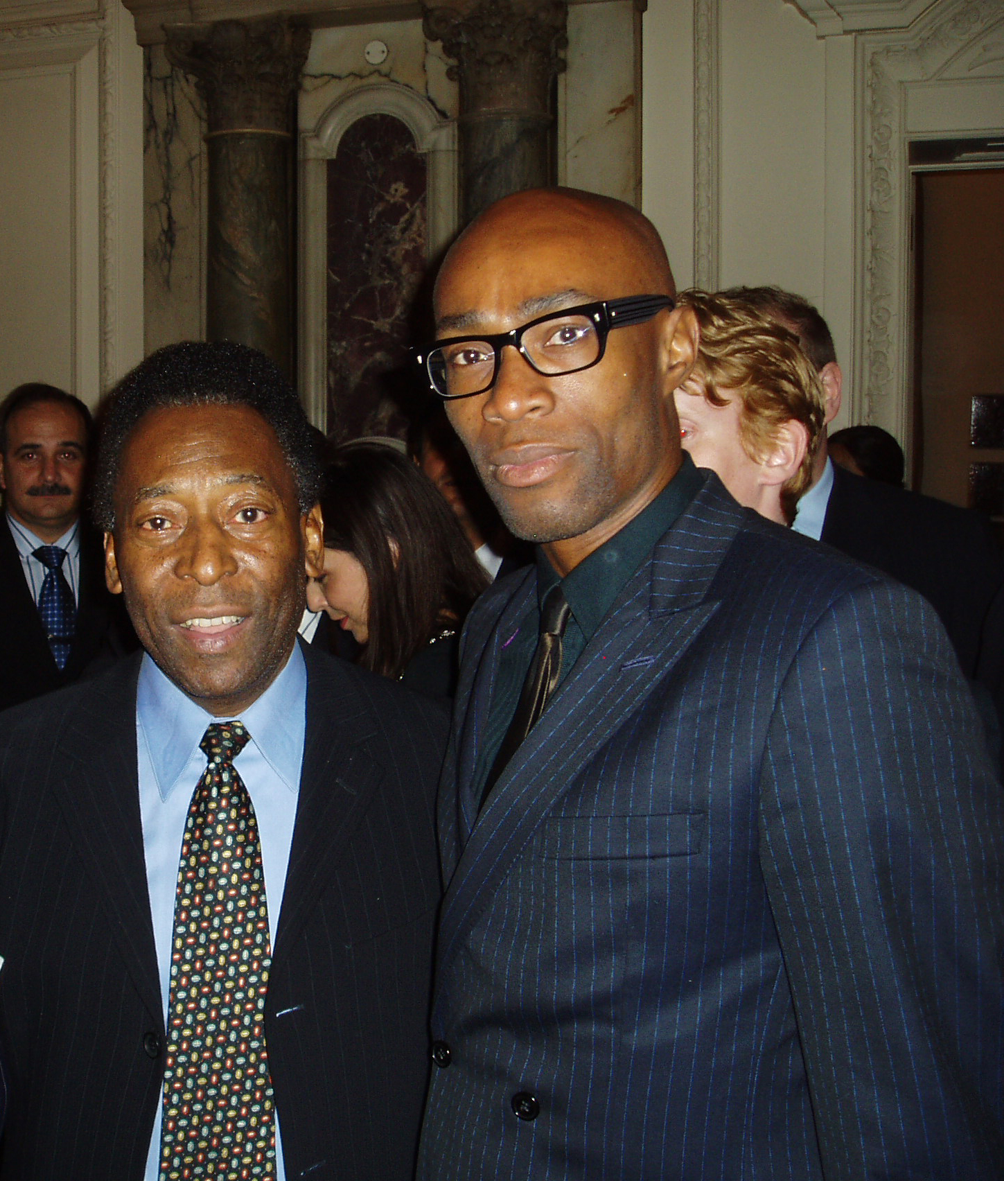 Pele and Ben Arogundade